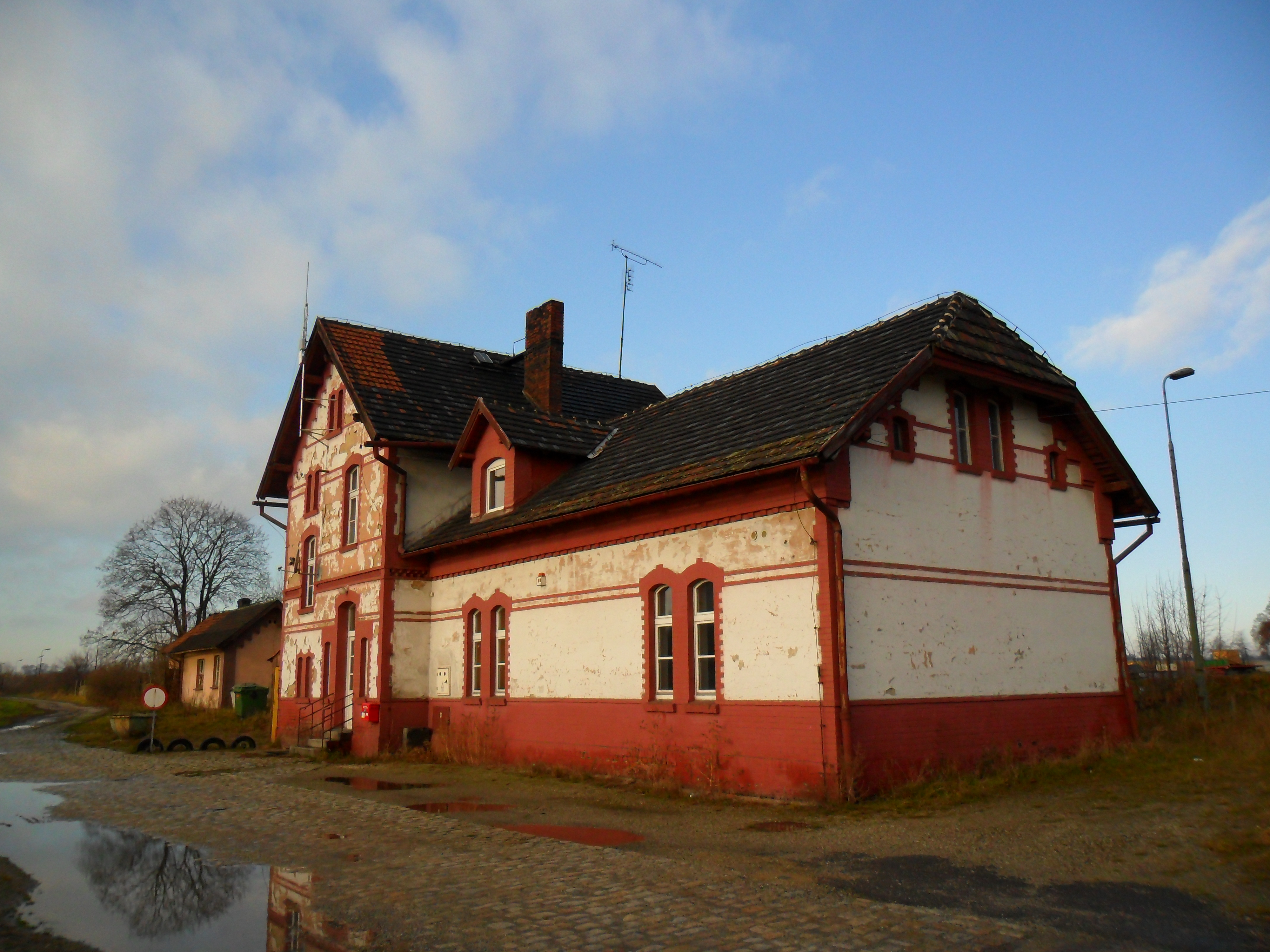 Nieczynna stacja kolejowa w Raciborzu-Studziennej. Widok z tyłu na budynek stacji.